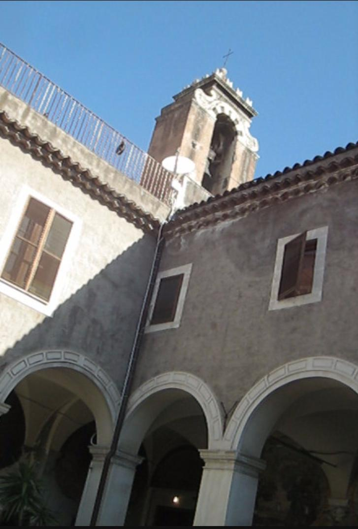 Convento di S. Maria del Gesù a Catania, oggi sede del Liceo Tecnico Industriale Archimede